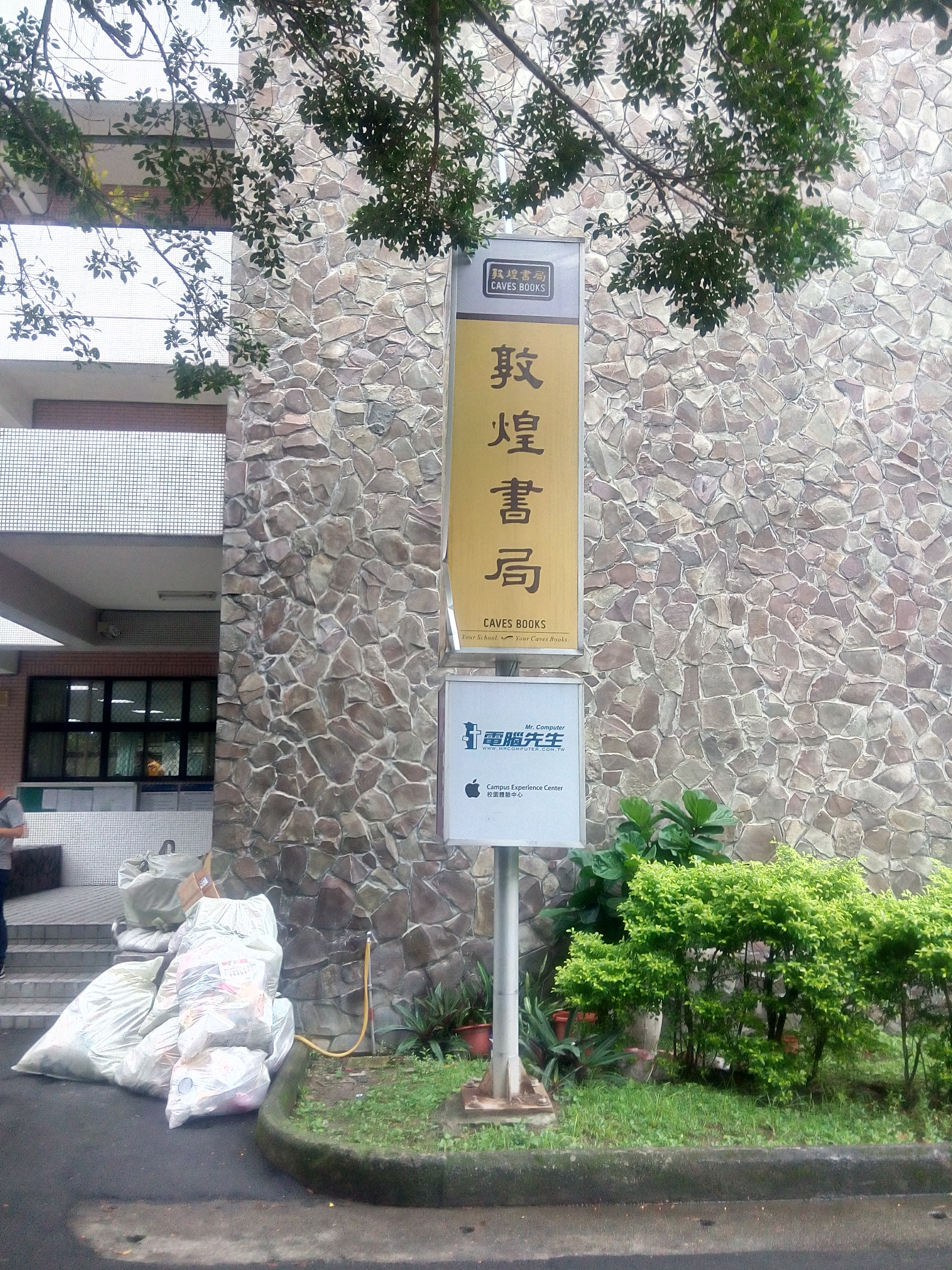 中文（台灣）: 敦煌書局招牌